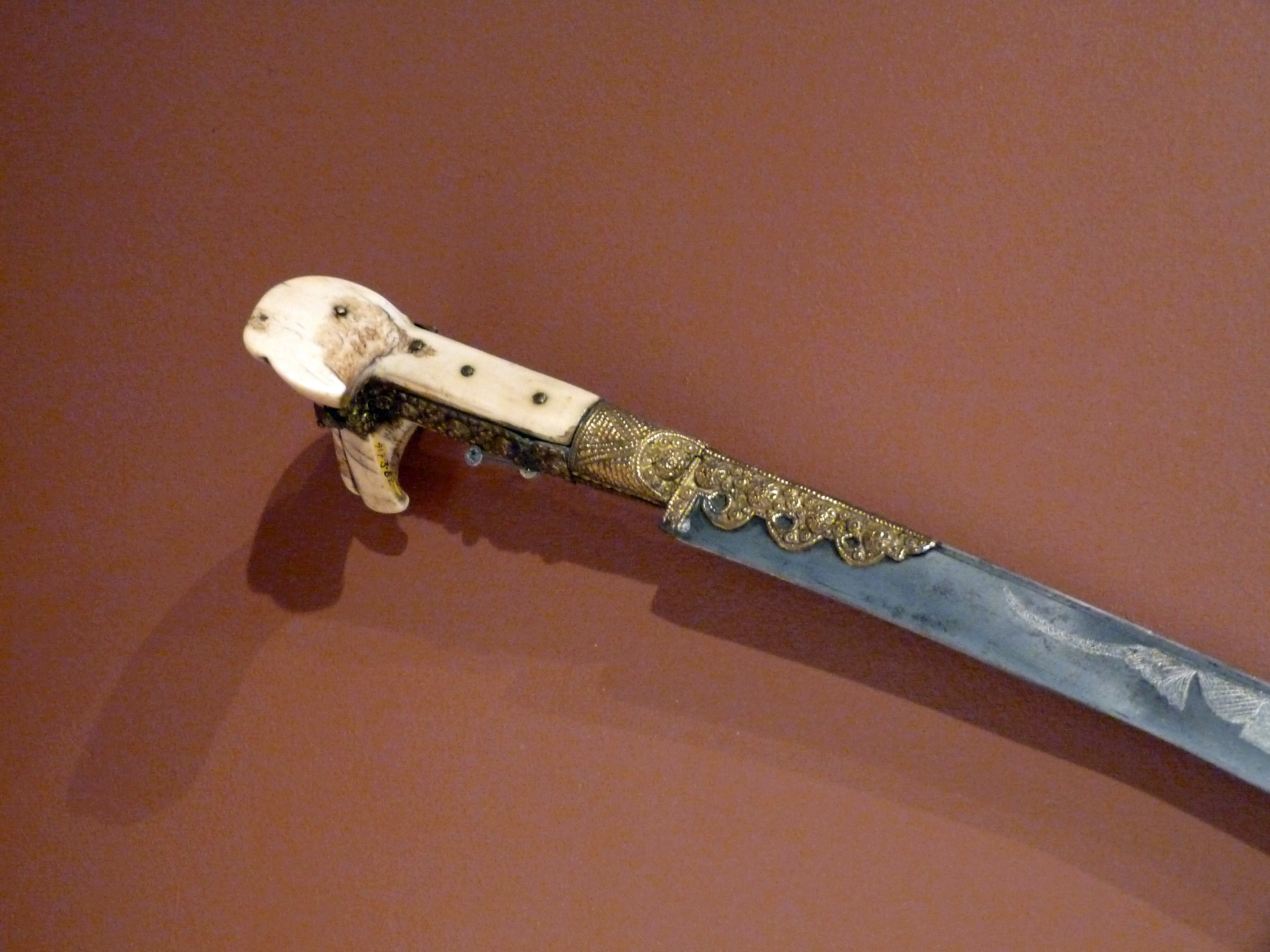 Sabre kandjar. Albanie. 19e s. Métal damasquiné, ivoire, pierres semi-précieuses. Musée barrois